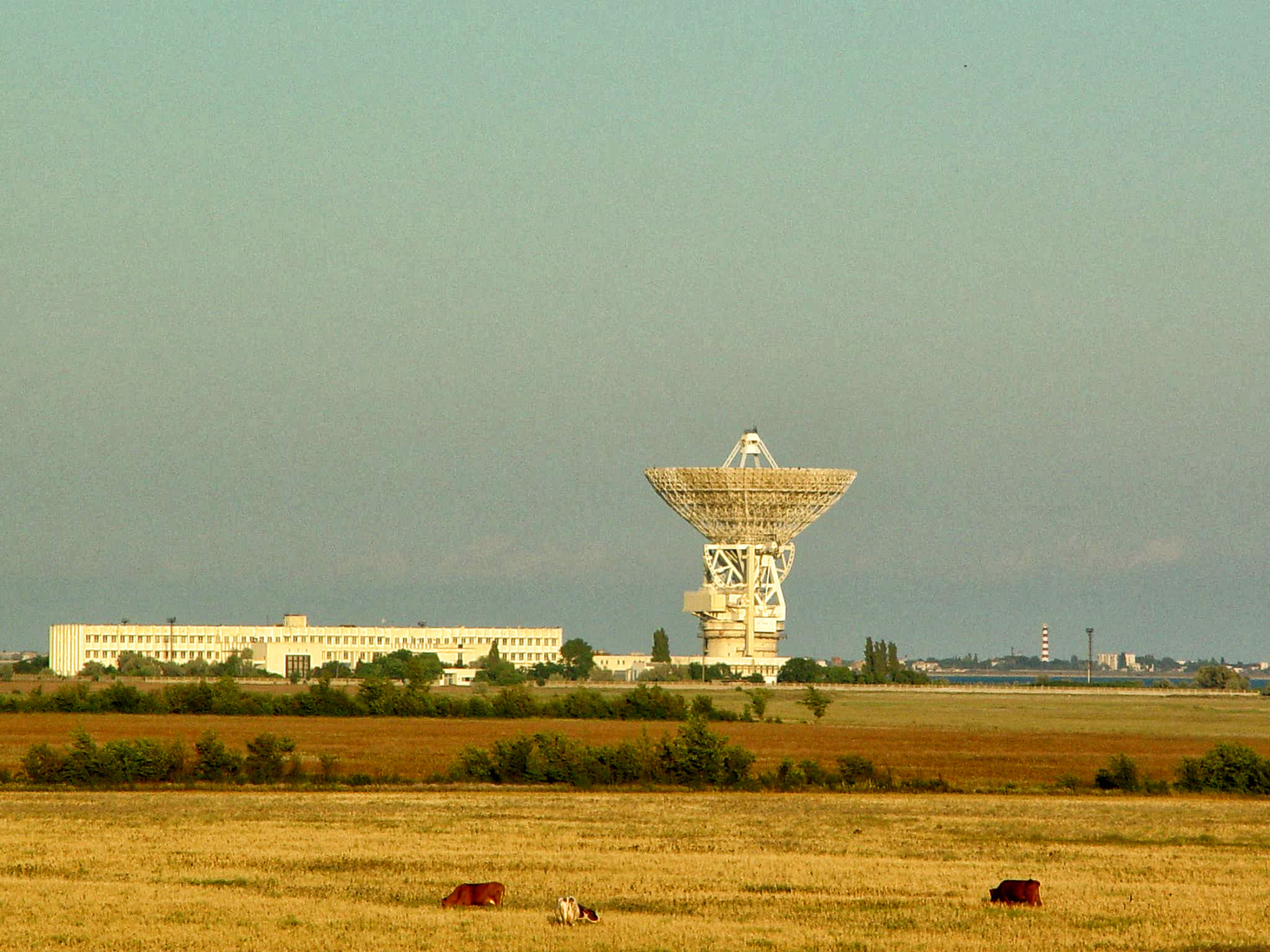 Вид на Третью площадку с запада.